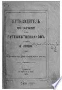 Путеводитель Марии Александровны Сосногоровой, 1871, Одесса